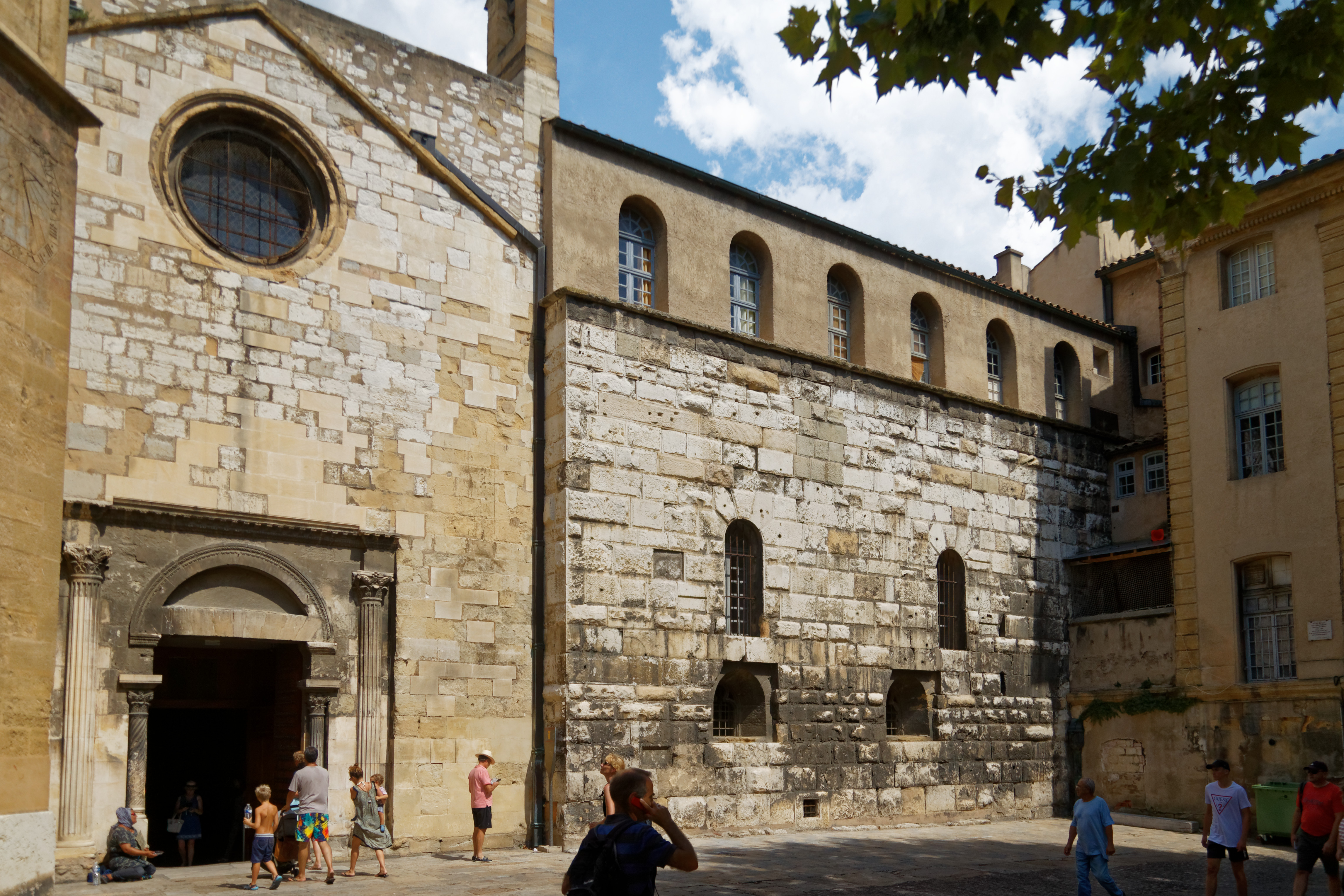 Kathedrale Saint-Sauveur in Aix-en-Provence, Westfassade des rechten Seitenschiffs, angrenzend römische Mauer